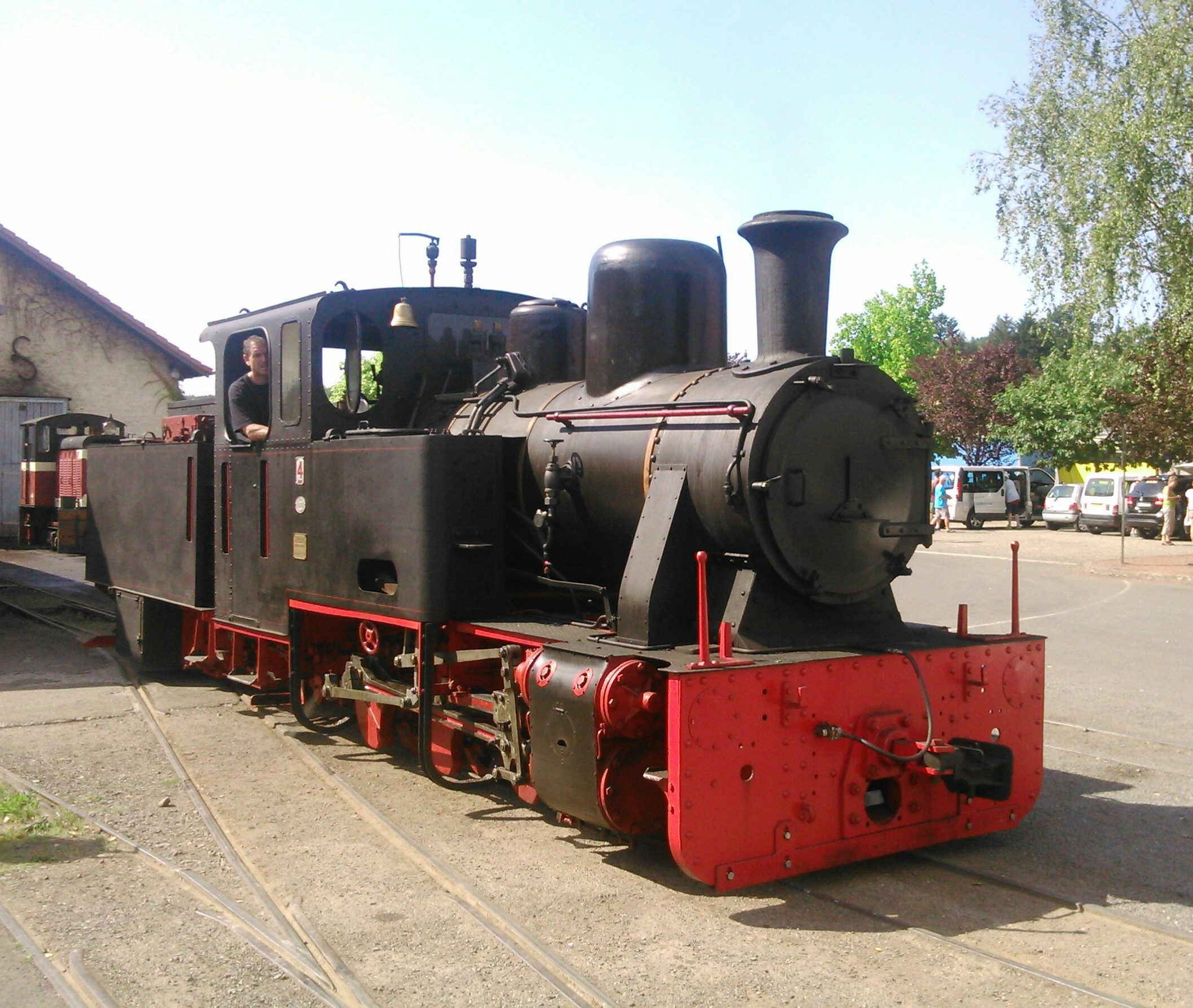 Chemin de fer forestier d'Abreschviller.